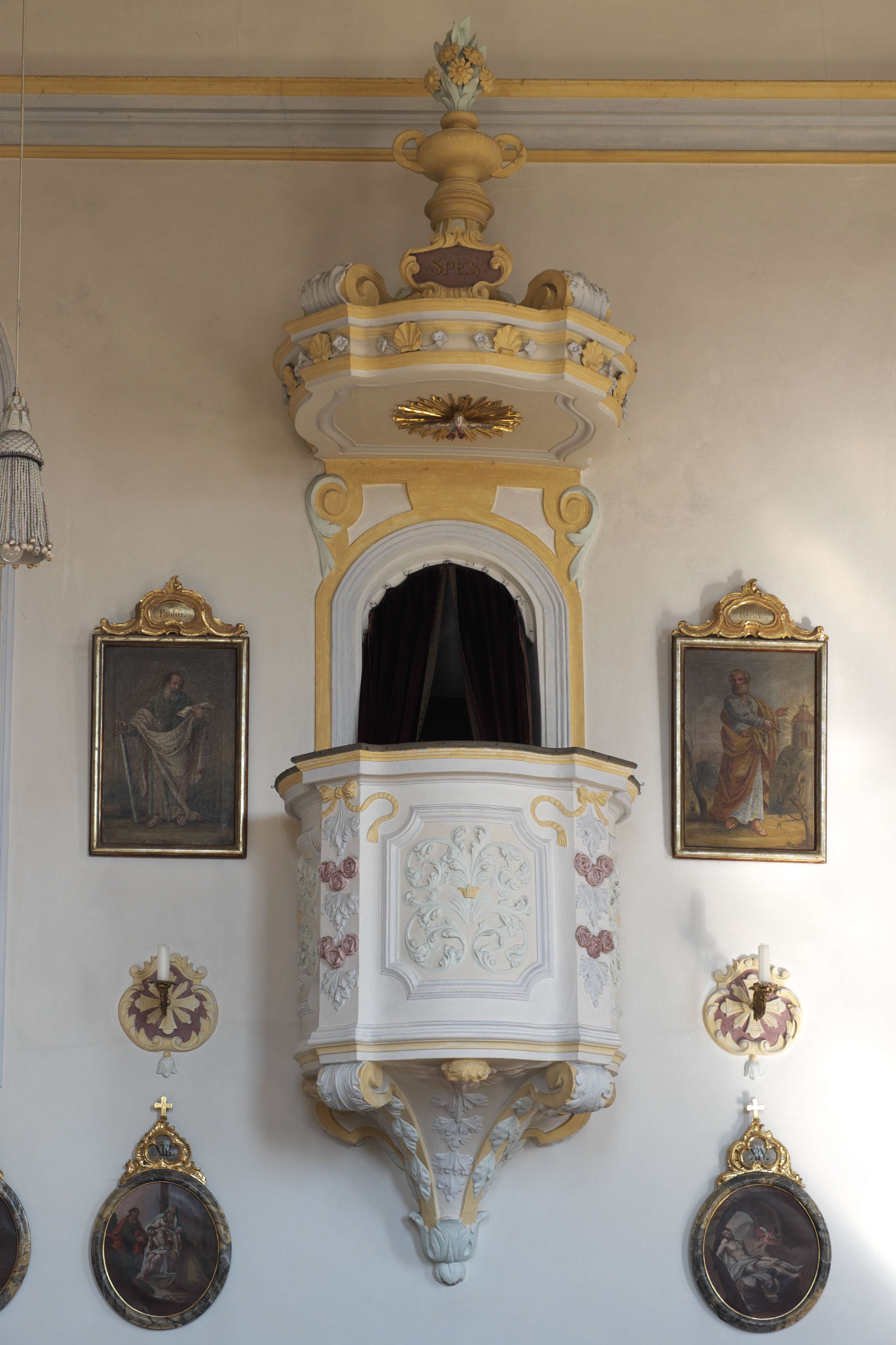 Katholische Pfarrkirche St. Martin in Penzing im Landkreis Landsberg am Lech (Bayern/Deutschland), Holzkanzel aus dem ersten Viertel des 18. Jahrhunderts